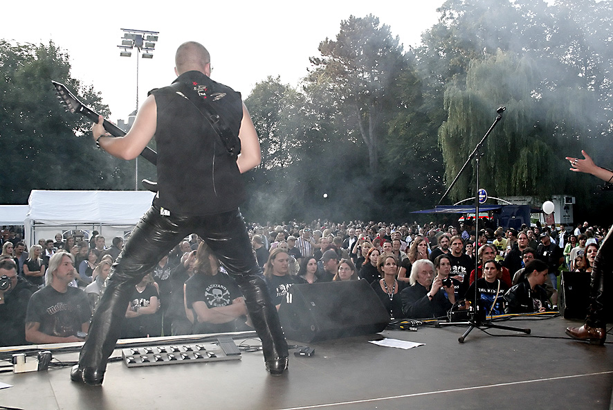 The Mystery, Deutsche Heavy-Metal-Band aus Heiligenhaus